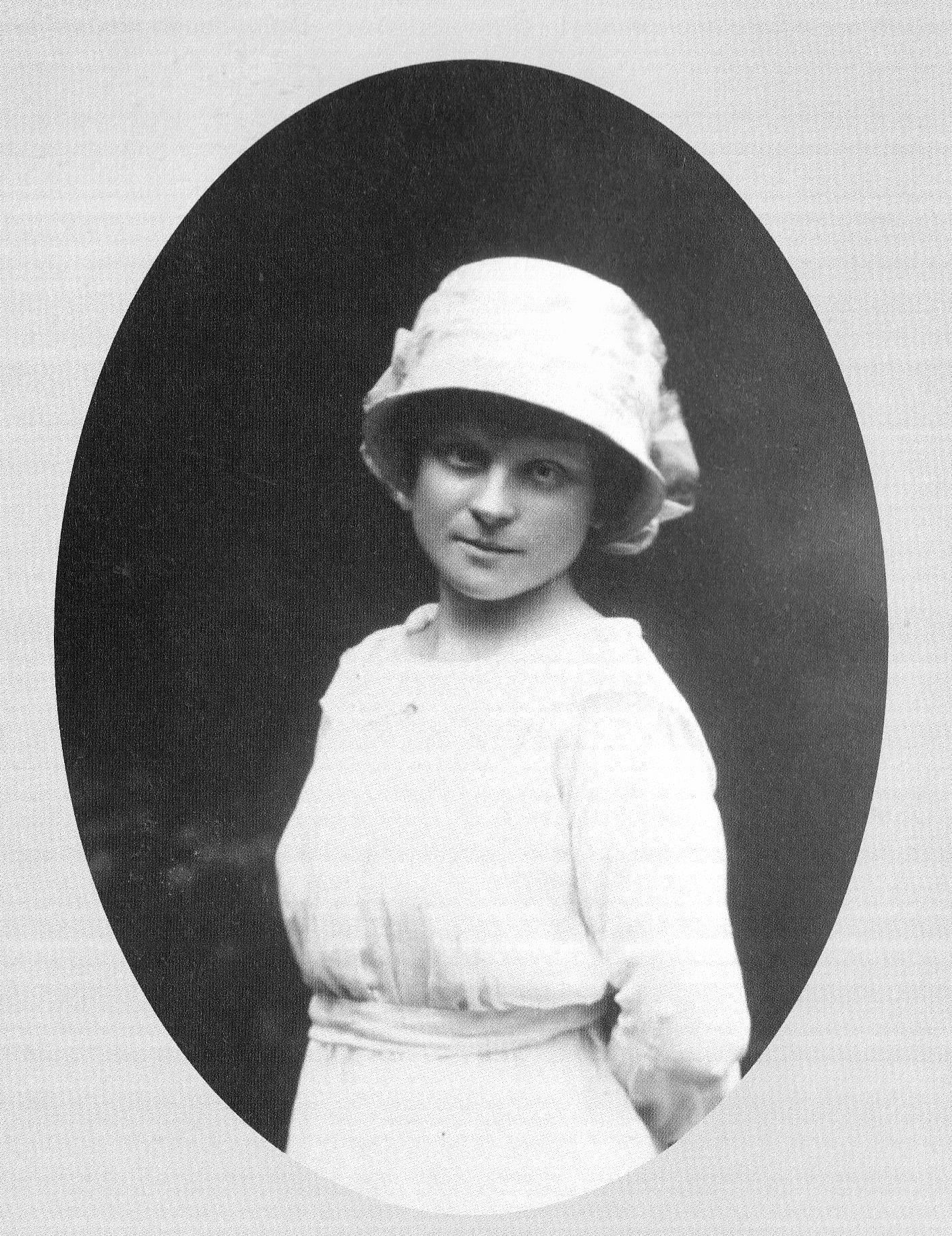 Portret Marii Dąbrowskiej